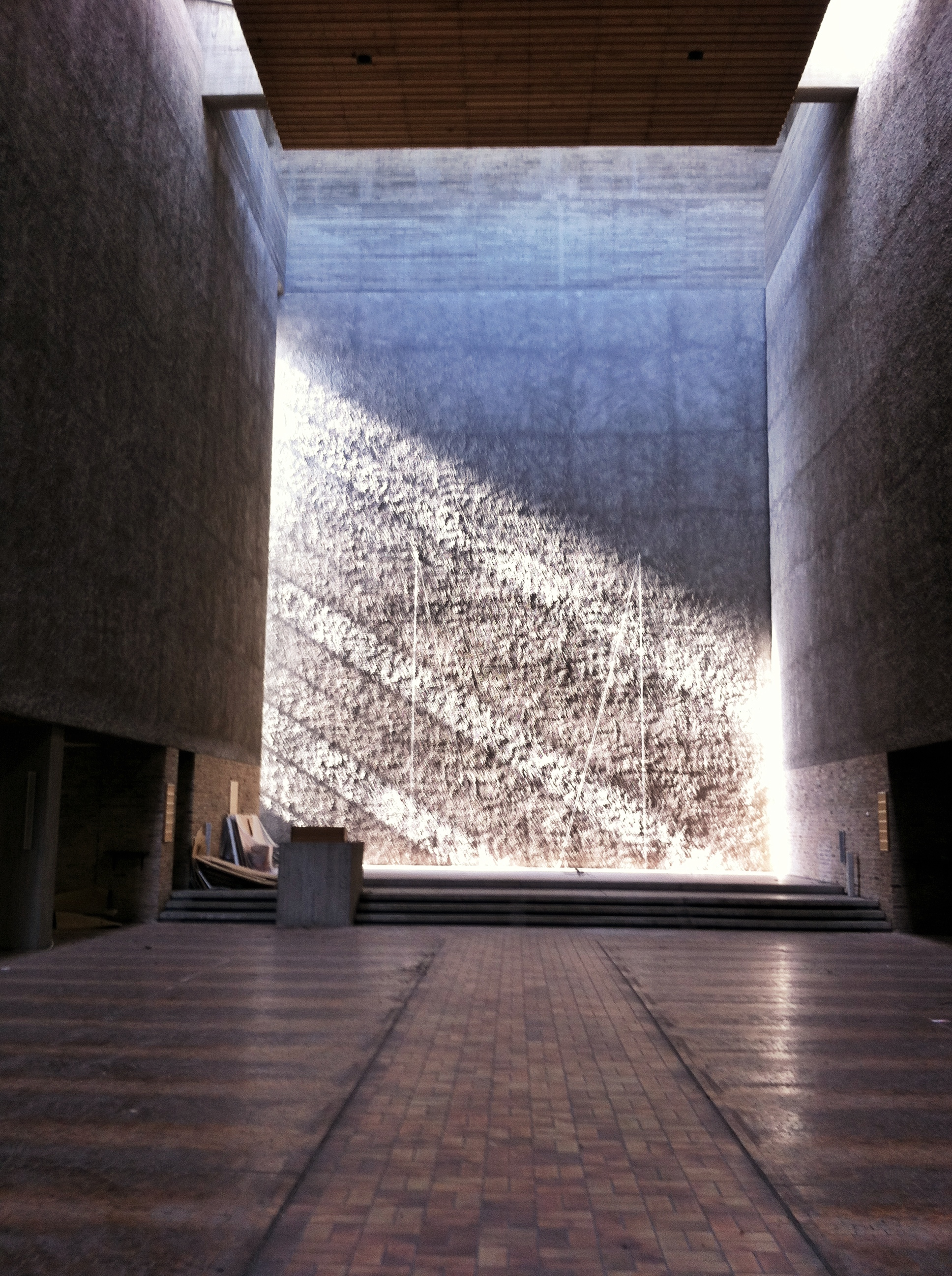 Lichteinfall St. Agnes